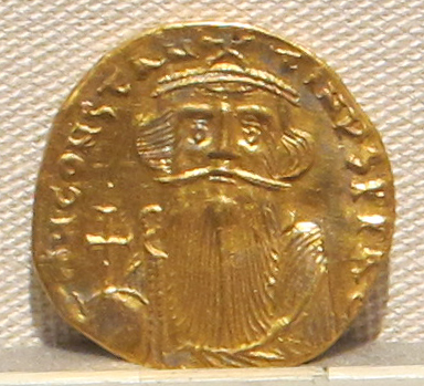 Palazzo Massimo alle Terme